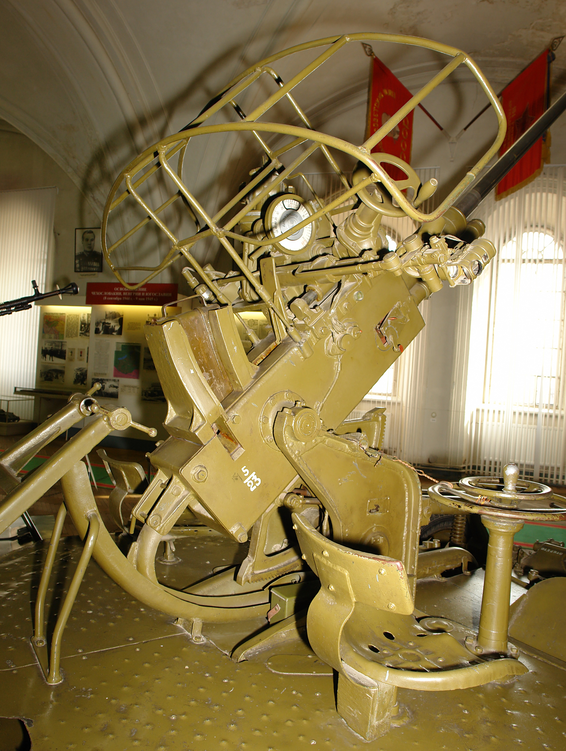 37-мм АВТОМАТИЧЕСКАЯ ЗЕНИТНАЯ ПУШКА обр. 1939 г. № 78381. Командир орудия—гвардии старший сержант Н. В. АНДРЮШОК. Орудийный расчет под командованием гвардии старшего сержанта Н. В. Андрюшка в составе гвардейской зенитной части в период Висло-Одерской операции прикрывая с воздуха одно из подразделений 4-й танковой армии. В районе Пославице он сбил два самолета и уничтожил несколько десятков гитлеровцев. Это были третий и четвертый самолеты на счету командира орудия. За умелые действия и личный героизм ему было присвоено высокое звание Героя Советского Союза. Военно-исторический музей артиллерии, инженерных войск и войск связи, Санкт-Петербруг.